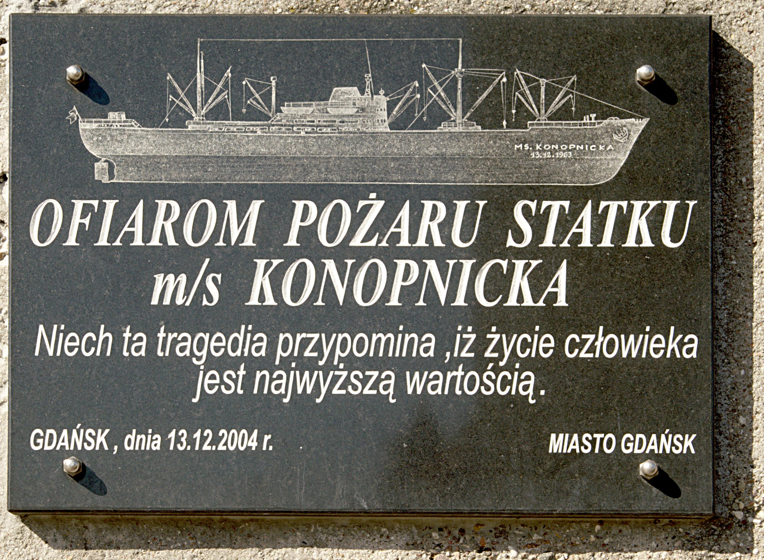 Tablica pamiątkowa ku pamięci 22 ofiar pożaru na MS "Konopnicka", w dn. 13 XII 1961 r..